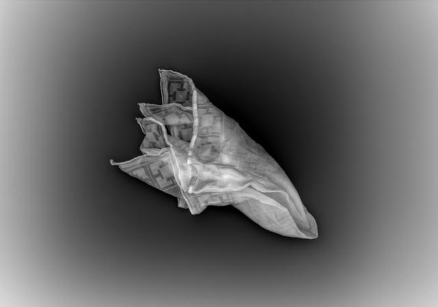 Věra Stuchelová´s photographs